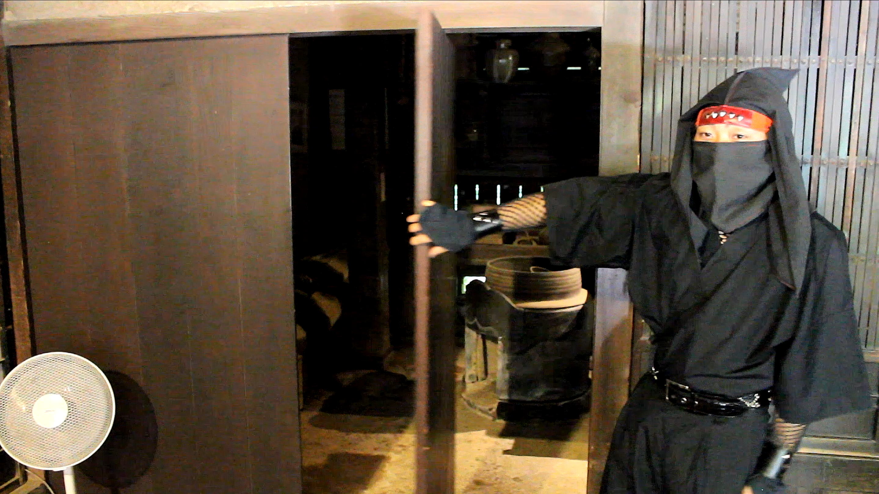 Un moniteur expliquant le mécanisme ds portes cachées